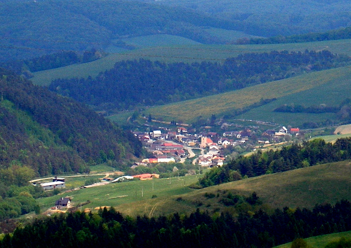 Obec Bajerov okres Prešov.